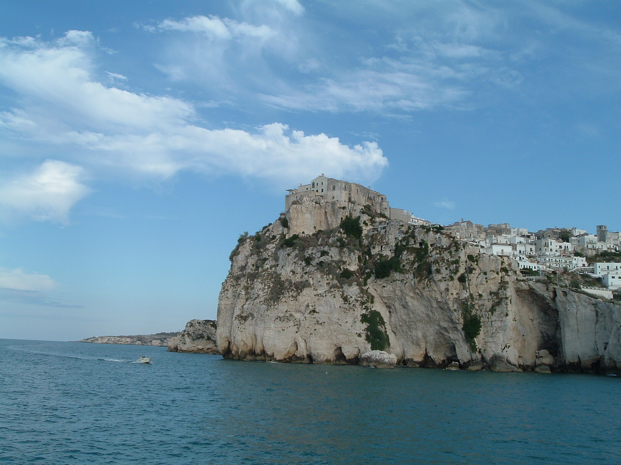 Vista di Peschici dal mare